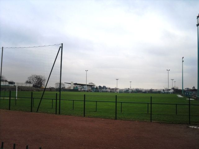 Le stade municipal de Morangis (91)